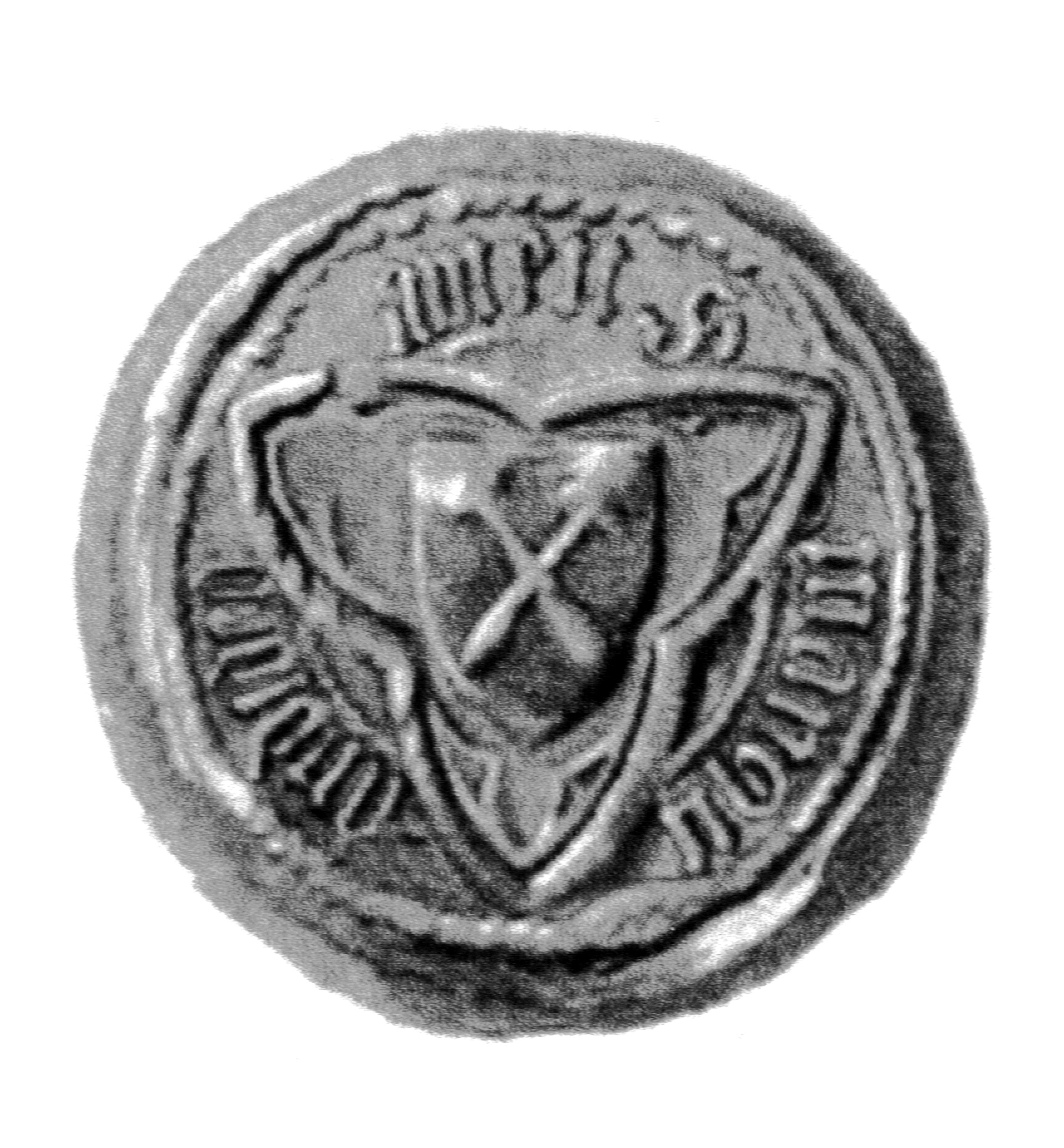 Siegel des Ratsmannes Marquard von Damen. Das Siegel stammt aus der Zeit um 1408. Siehe Emil Ferdinand Fehling: Lübeckische Ratslinie, Nr. 426 (Marquard von Dame, BM).